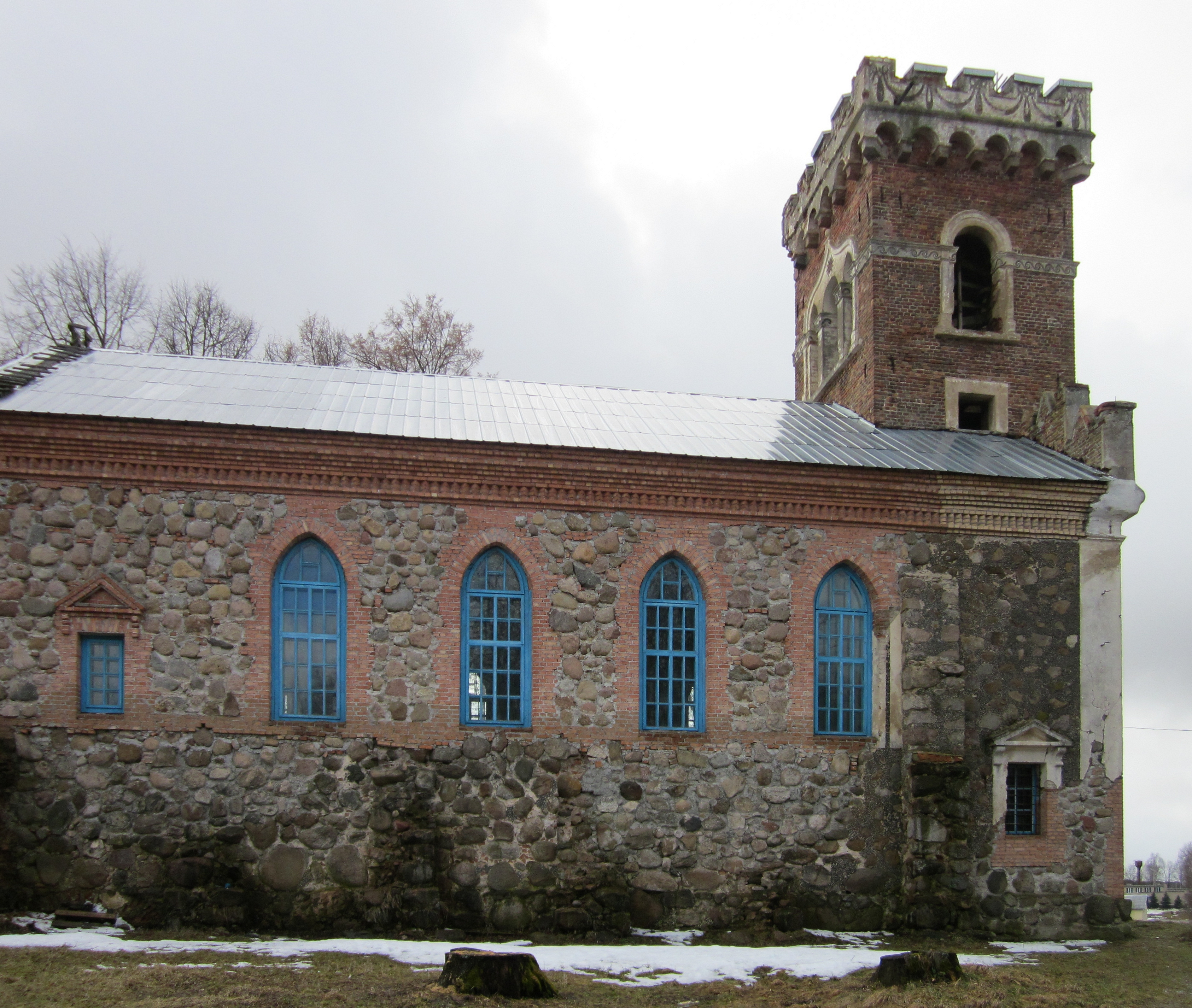 Беларуская (тарашкевіца): Царква Сьв. Барбары. в. Райца This is a photo of Belarusian heritage monument. Reference number: 413Г000323 ( WLM)